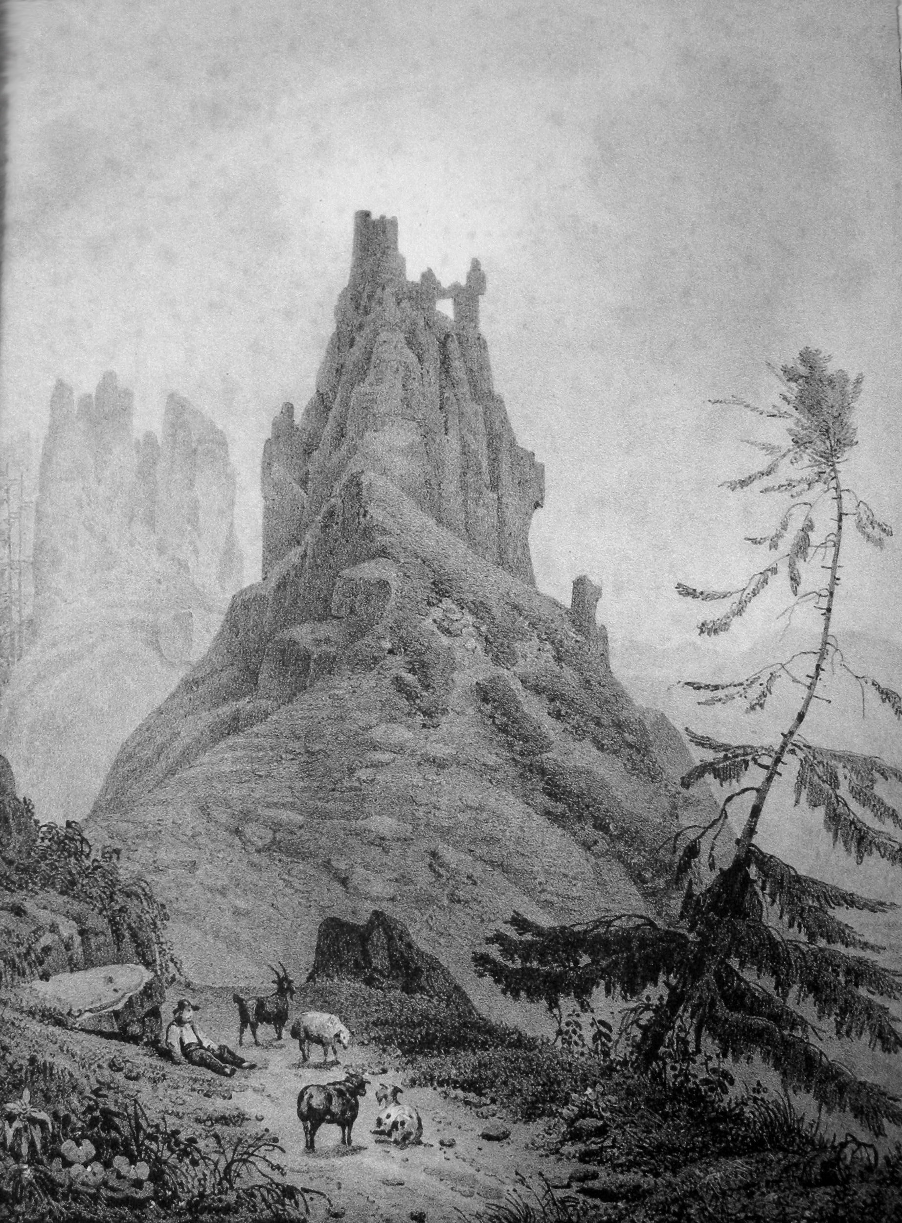 Lithographie "Vue sur le Château de la Roche" en Alsace (Musée Jean-Frédéric Oberlin)